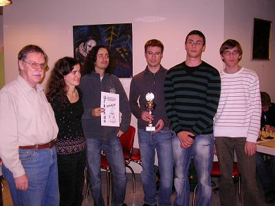 Augusta Vindelicorum (Augsburg I) mit Pitl, Nuber, Grimberg und Billing bei der Offenen Internationalen Bayerischen Hochschulmannschaftsmeisterschaft im Schach, Oktober 2009 in Augsburg (links die Organisatoren: Klaus Norbert Münch und Katarzyna Woniak).